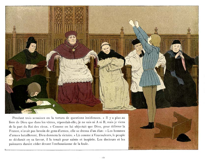 Jeanne d'Arc. first days at court